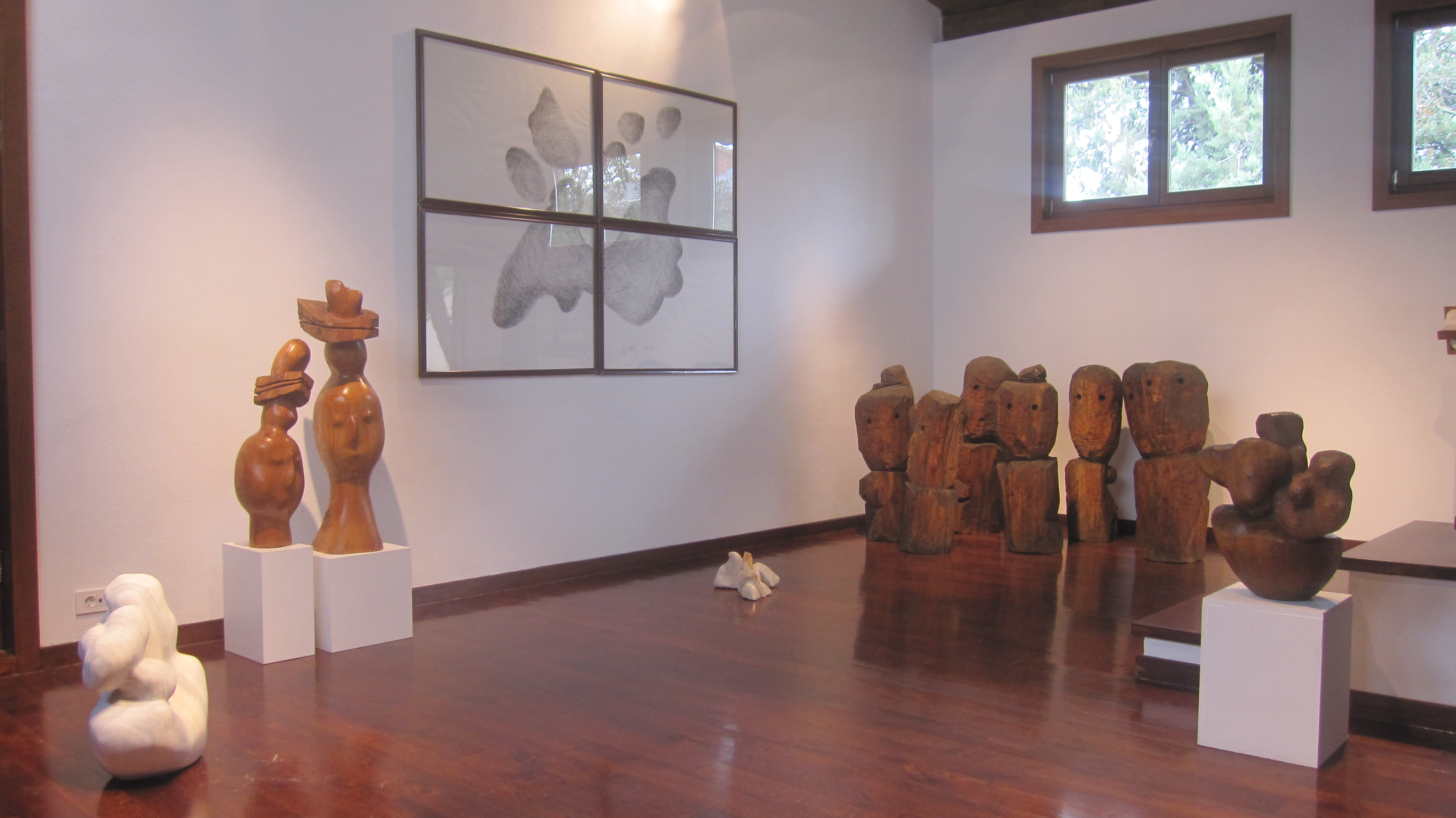 Galeria e arteve – Agim Çavderbasha